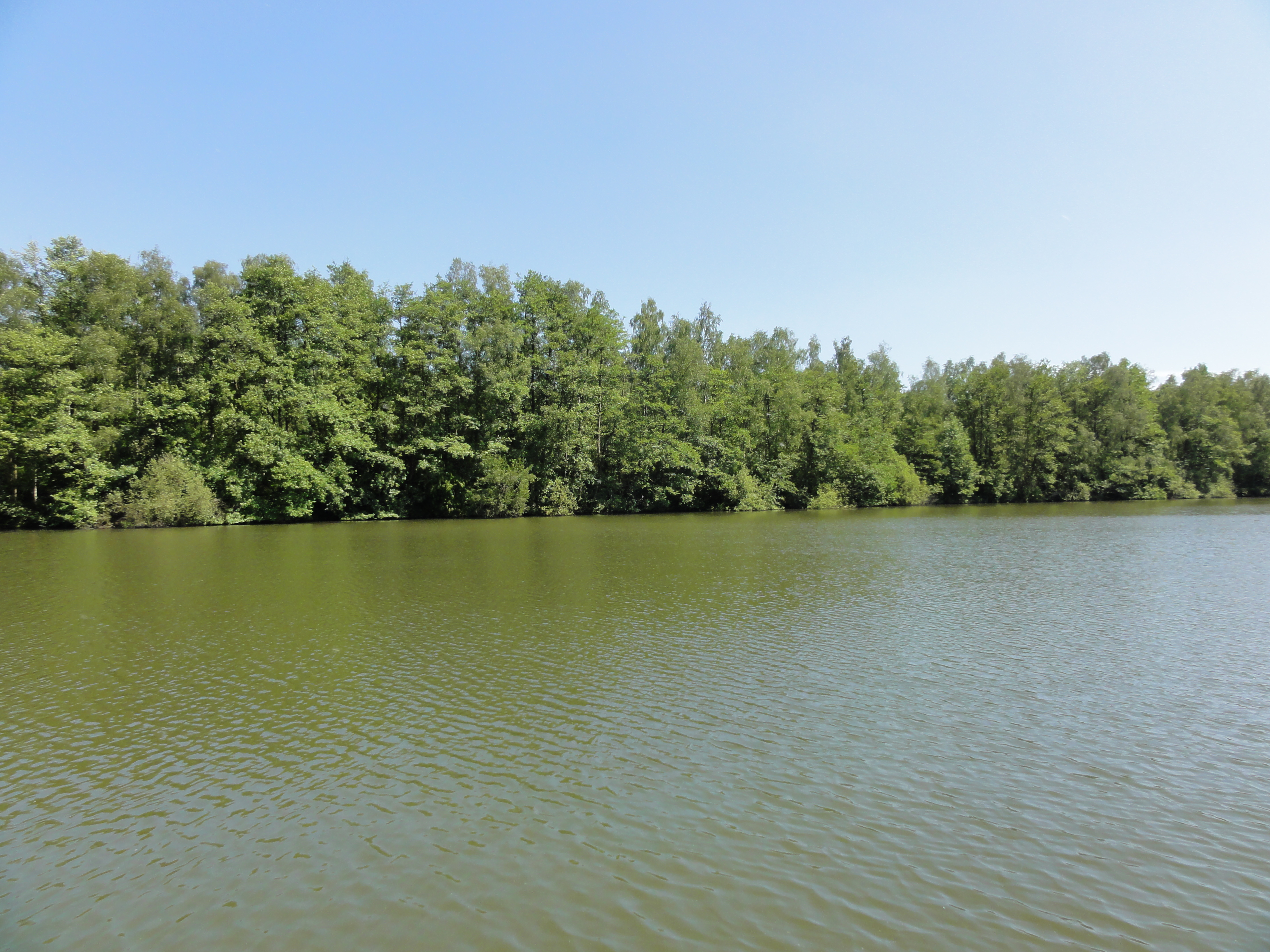 Terril n° 172 dit Prussien, Fosse n° 1 de la Compagnie des mines de Vicoigne, Raismes, Nord, Nord-Pas-de-Calais, France.